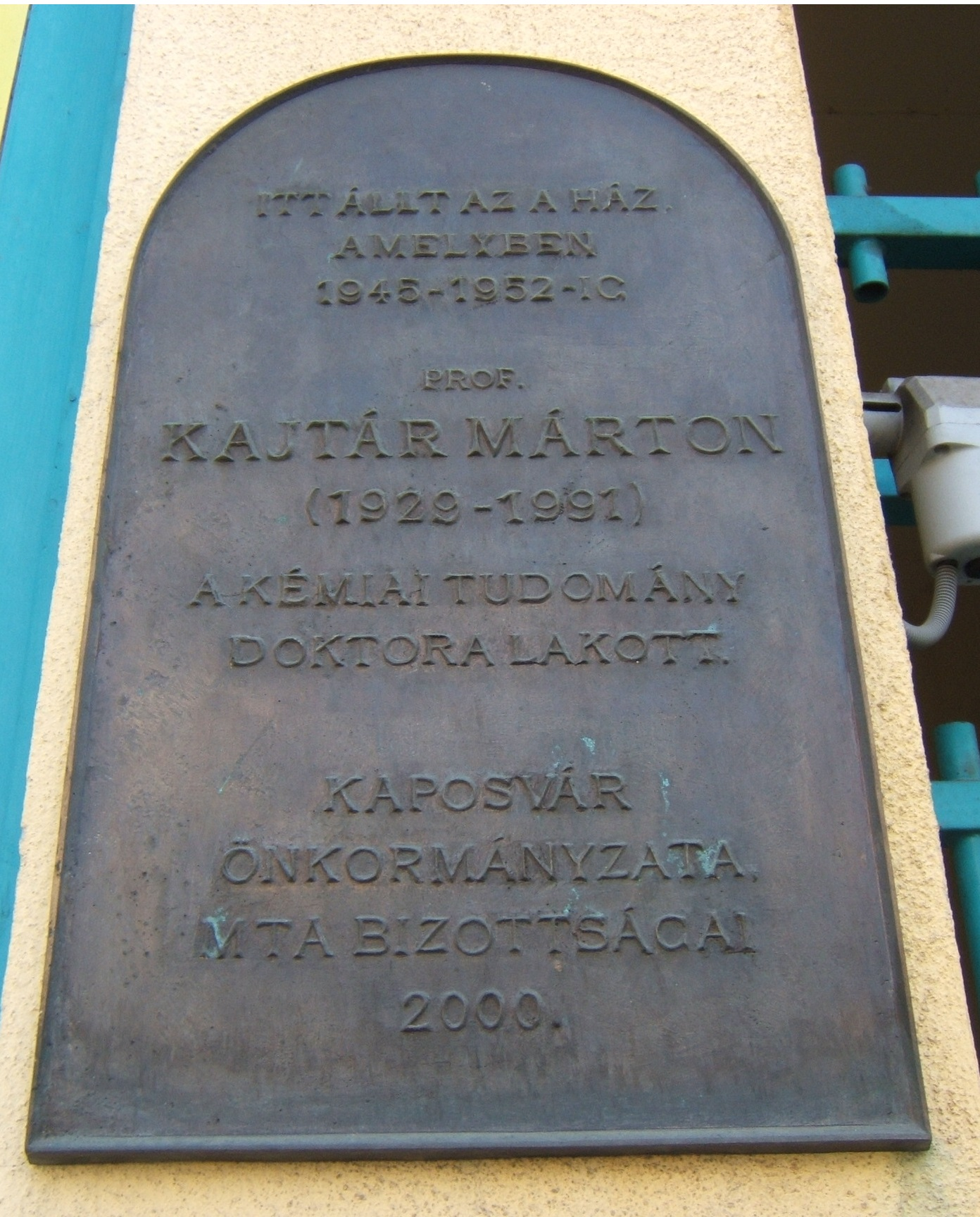 Kajtár Márton emléktáblája Kaposváron